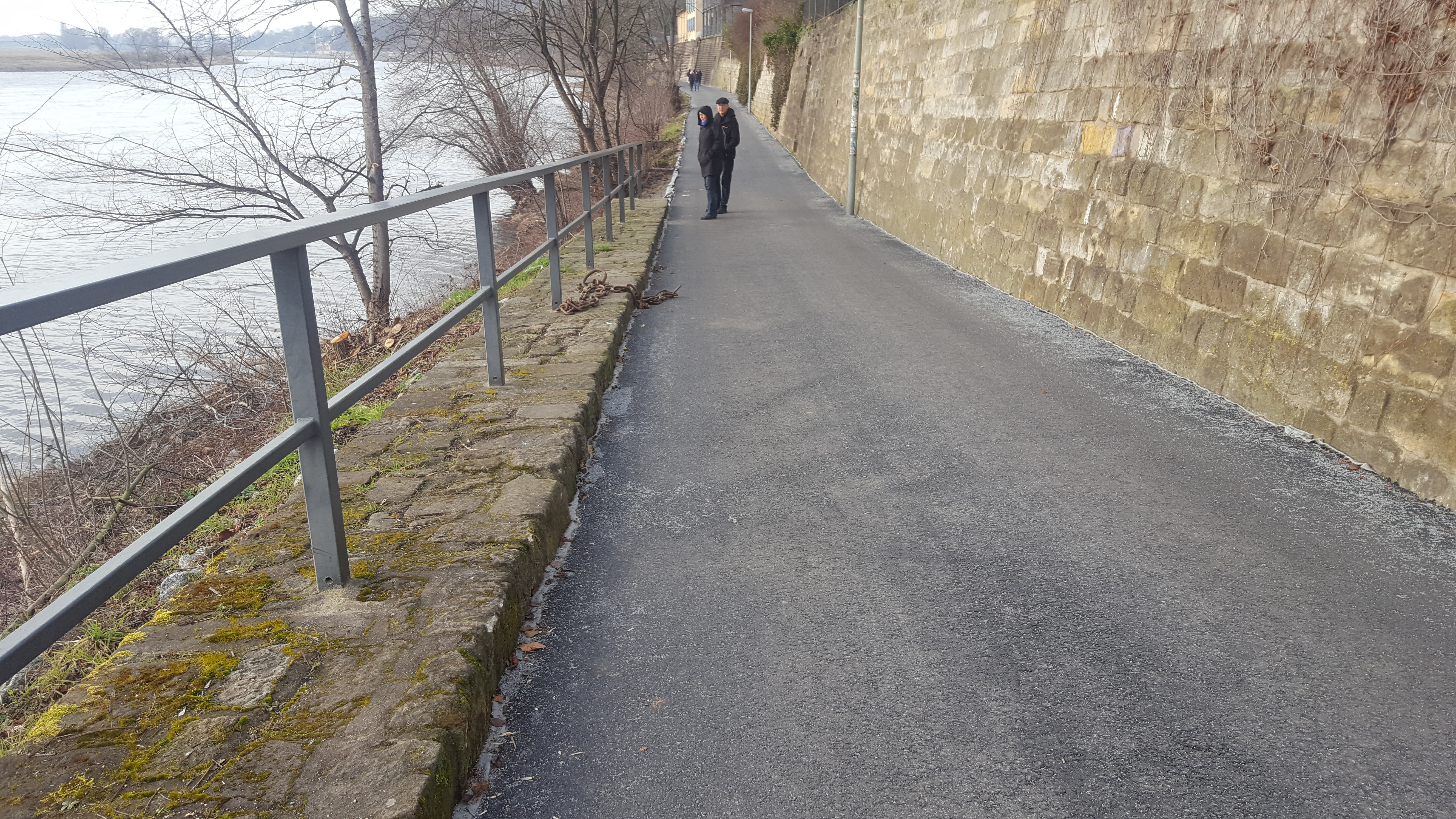 Dresden Körnerweg: Der Körnerweg entstand bereits vor dem Jahr 1700 und verband als Marktweg das Dorf Loschwitz mit der Stadt Altendresden (Dresdner Neustadt). Die Händler und Bauern brachten so ihre Erzeugnisse in die Stadt. Im Zeitalter der Industrialisierung benutzten die Bomätscher (Schiffszieher) den Weg zum Ziehen der Elbkähne. Der Weg wurde um 1908 verbreitert und endete an der Holzhofgasse. Heute wird er von Wanderern und Spaziergängern genutzt und ist Bestandteil des Elberadweges. Sanierung ist geplant.